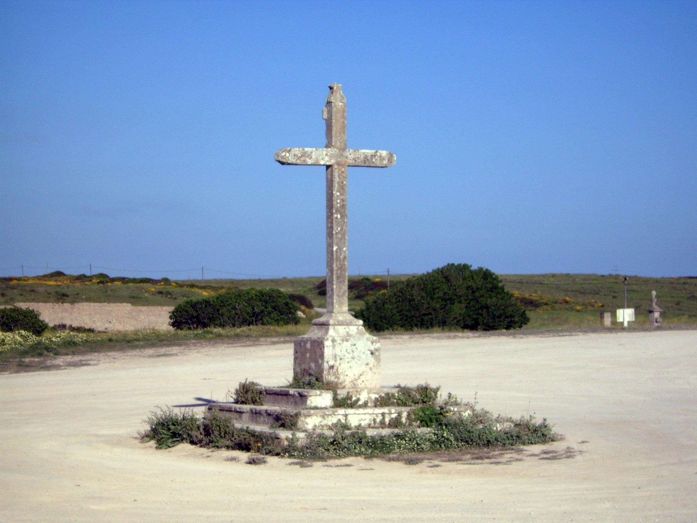 Cruzeiro Local : Santuário de Nossa Senhora da Pedra Mua / Cabo Espichel - Sesimbra - Portugal Local - Cabo Espichel / Sesimbra / Portugal user:sacavem (pt) (usuário:sacavem)